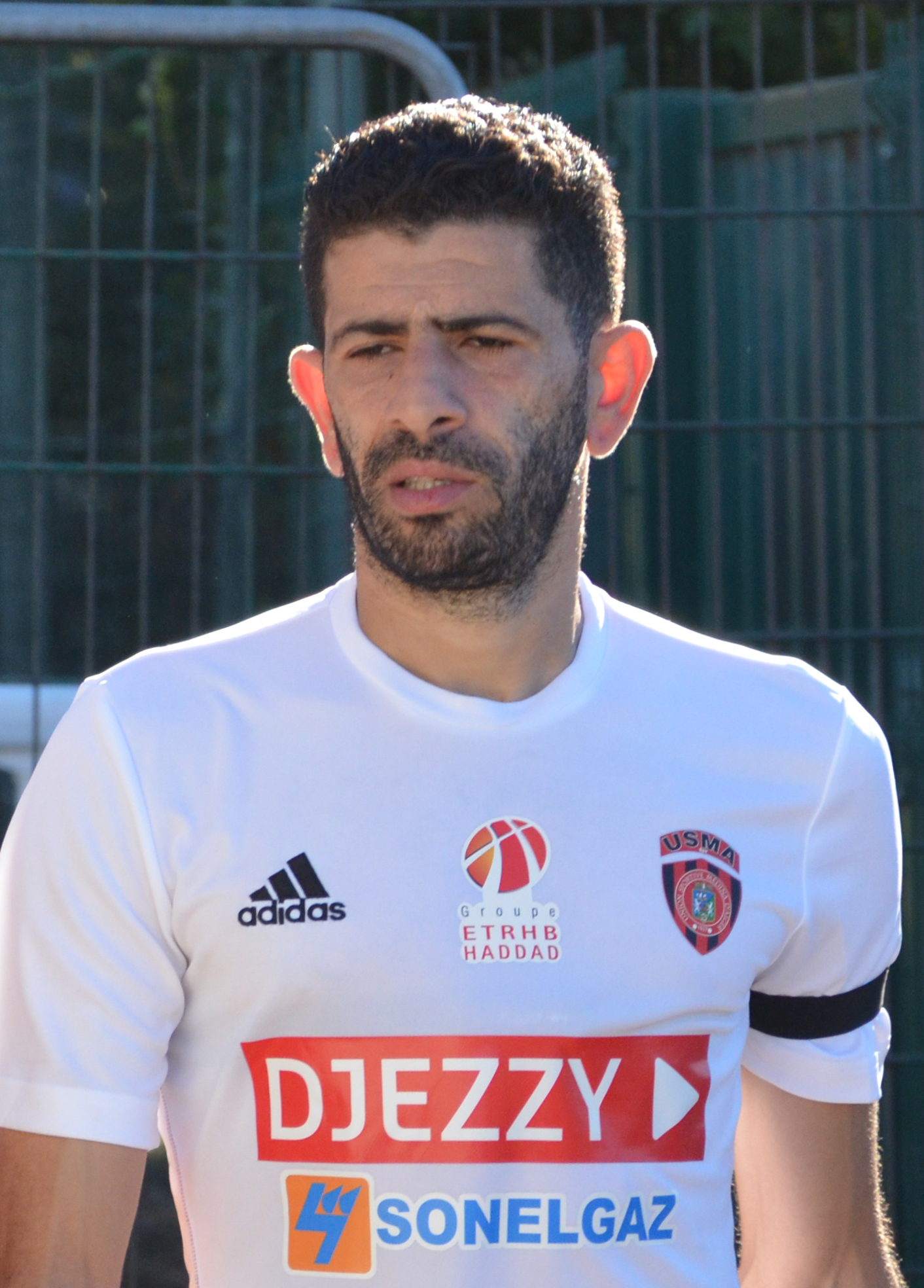 Photographie prise lors du match opposant le Stade rennais à l'USM Alger en match amical au stade Paul-Audrin de Dinard le 16 juillet 2016. Ici, Mohamed Meftah.